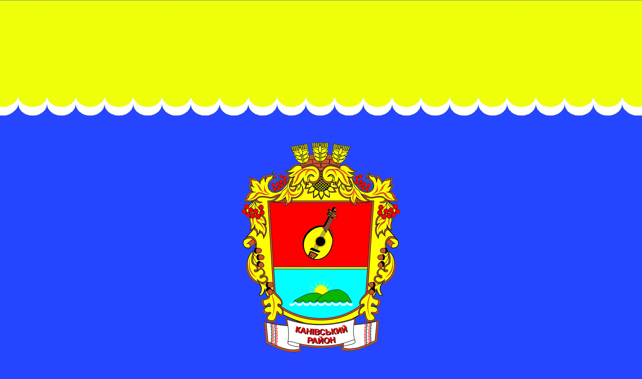 Прапор Канівського району